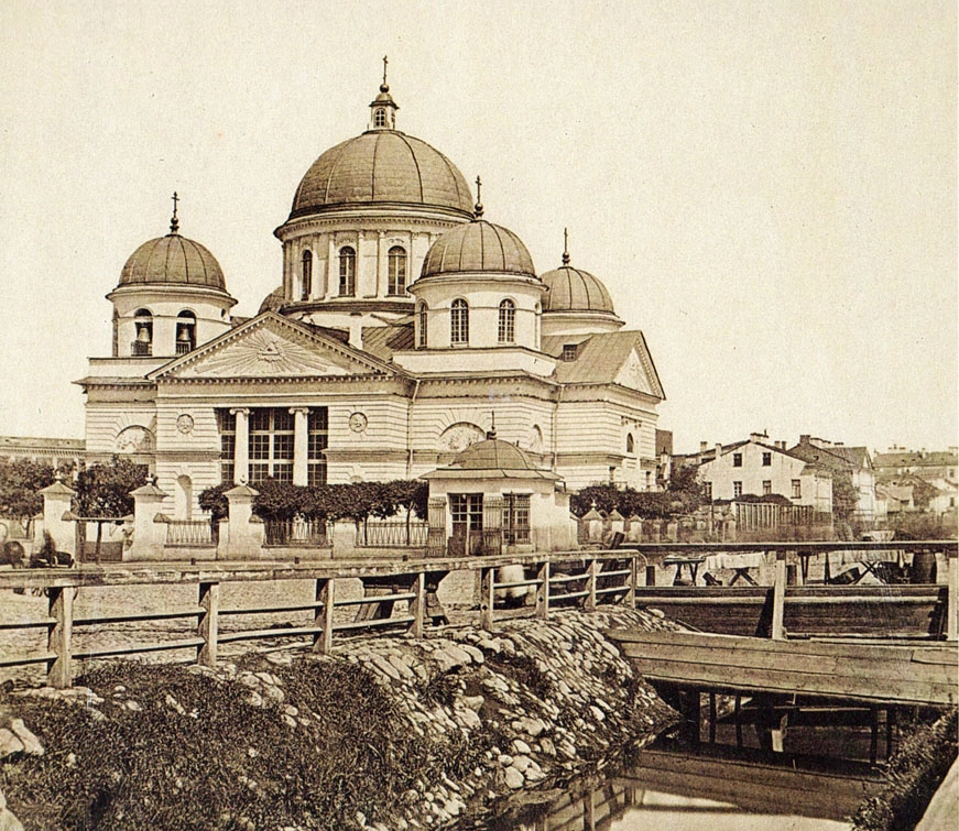 Лиговский канал у Знаменской церкви. Фото 1860-х